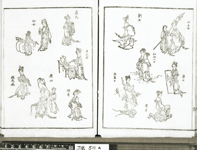 Croquis du Bumpo Kanga de Kawamura Bumpo (1803)